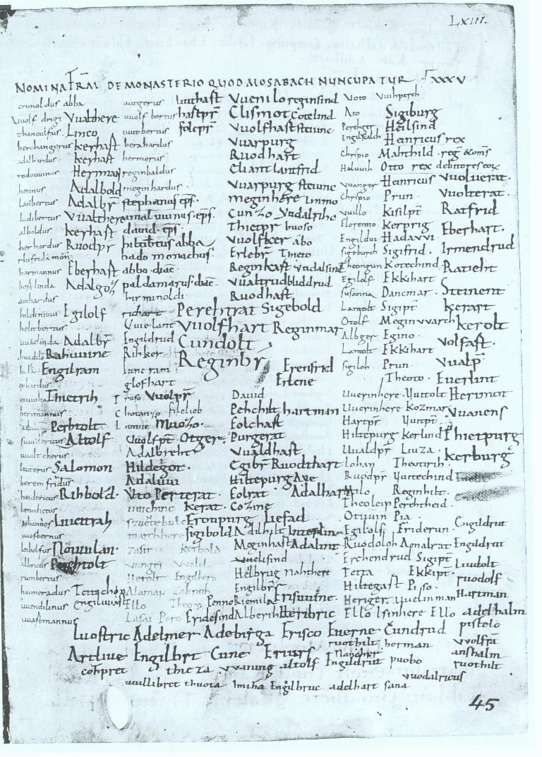 Namenseintrag Ottos I. als König seiner Familie im Reichenauer Verbrüderungsbuch. Zürich, Zentralbibliothek, Rh. hist. 27, pag. 63